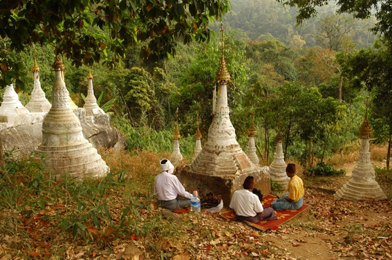 Bildbeschreibung: Meditierende Gläubige bei einem Kloster unterhalb des goldenen Felsens Quelle: Stefan Grünig, Privatarchiv Fotograf: Bild von Stefan Grünig, CH-3752 Wimmis (Benutzer:Sgruenig) Datum: Februar 2006